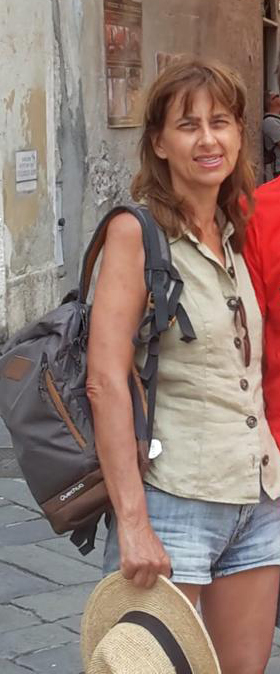 Pittrice italiana